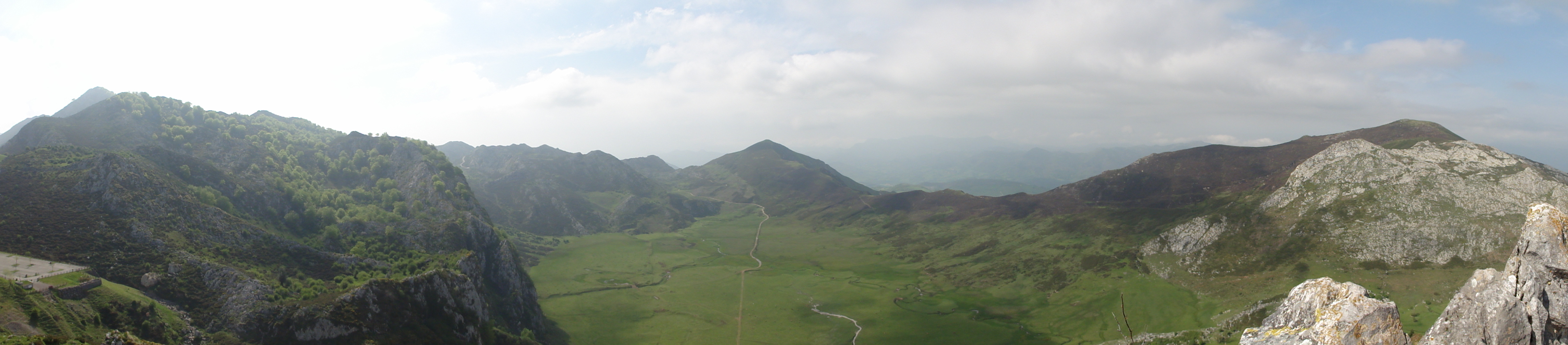 Vistas desde el Mirador del Príncipe en el Parque Nacional de los Picos de Europa This is a photography of a Special Area of Conservation in Spain with the ID: ES1200001. Natura2000 entry, EEA entry